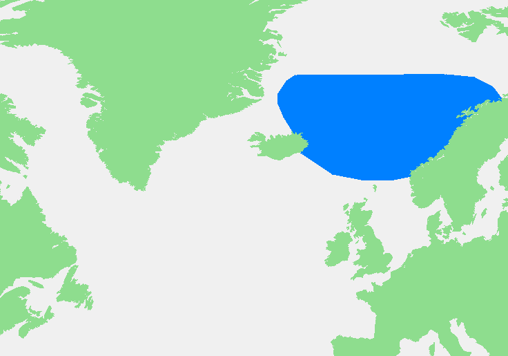 Noorse zee.PNG